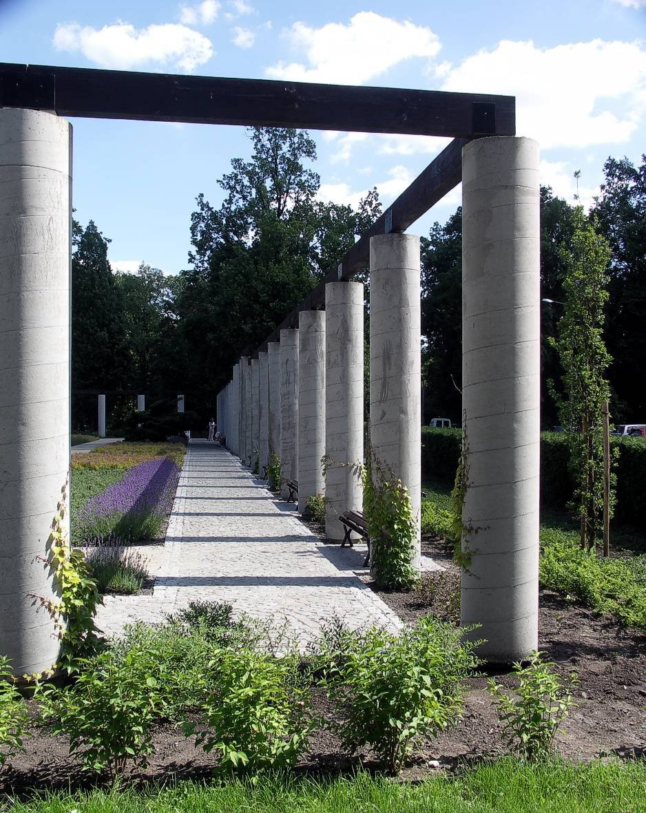 Trejaż umieszczony za pomnikiem Fryderyka Chopina w Parku Południowym we Wrocławiu w roku 2005, tj. rok po jego zbudowaniu. Już po paru latach słupy całkiem znikły pod obrastającymi je roślinami, których pierwsze pnącza nieśmiało rozpoczynają - jak widać na zdjęciu - swoją drogę ku górze